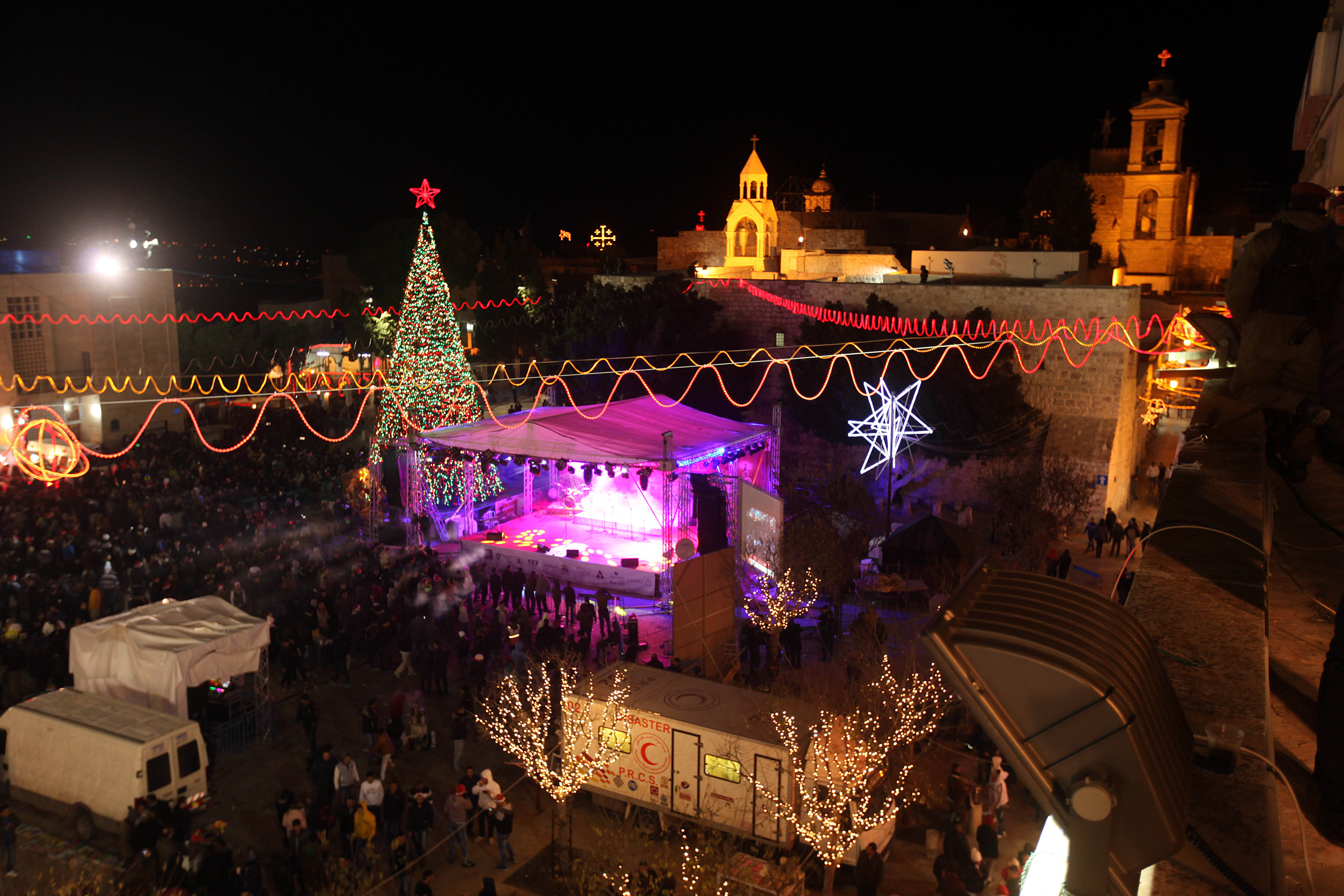 عيد الميلاد في كنيسة المهد، بيت لحم